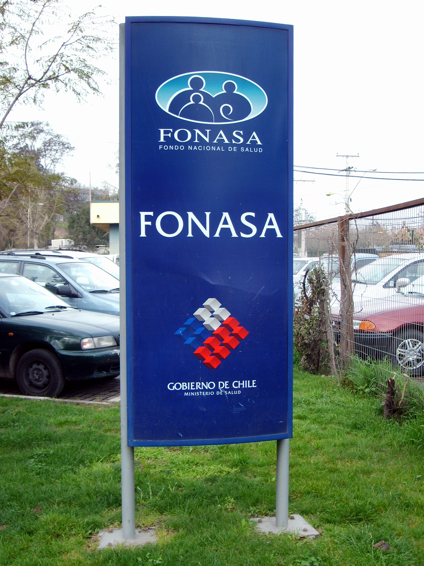 El letrero del Fondo Nacional de Salud de Chile en el Centro de Referencia de Salud en la comuna de Maipú, Santiago.